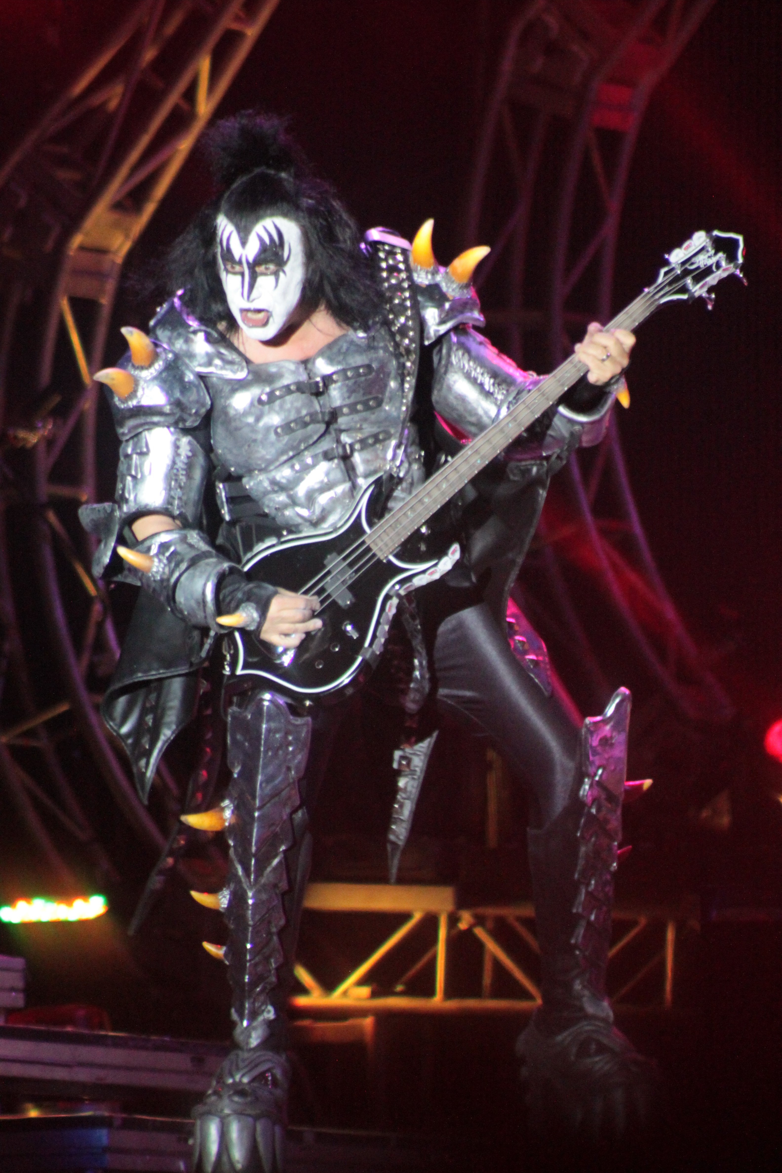 Gene Simmons, Kiss, Hellfest 2013, Fr-44-Clisson.